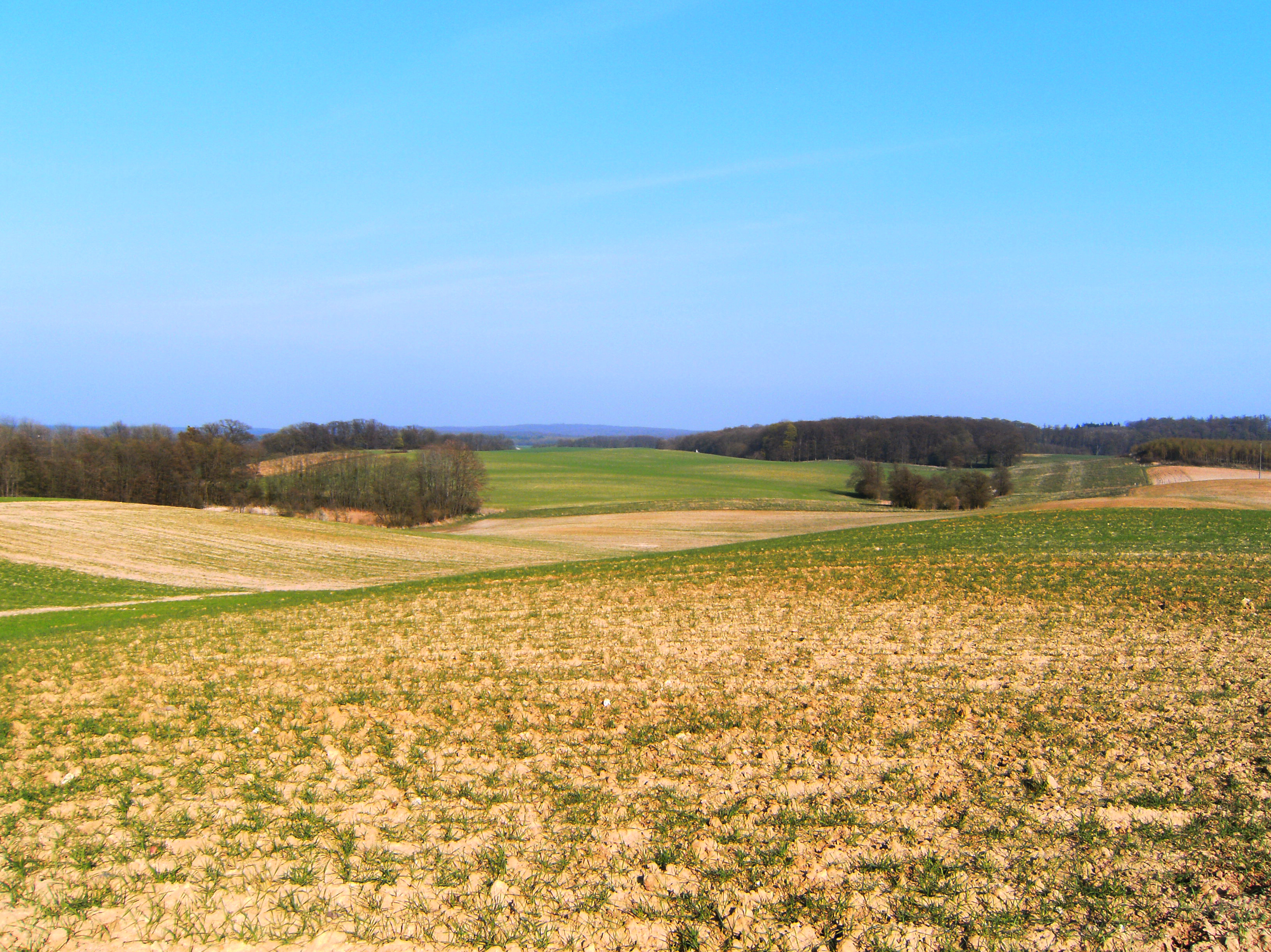 Endmoränenlandschaft bei Klepelshagen in den Brohmer Bergen